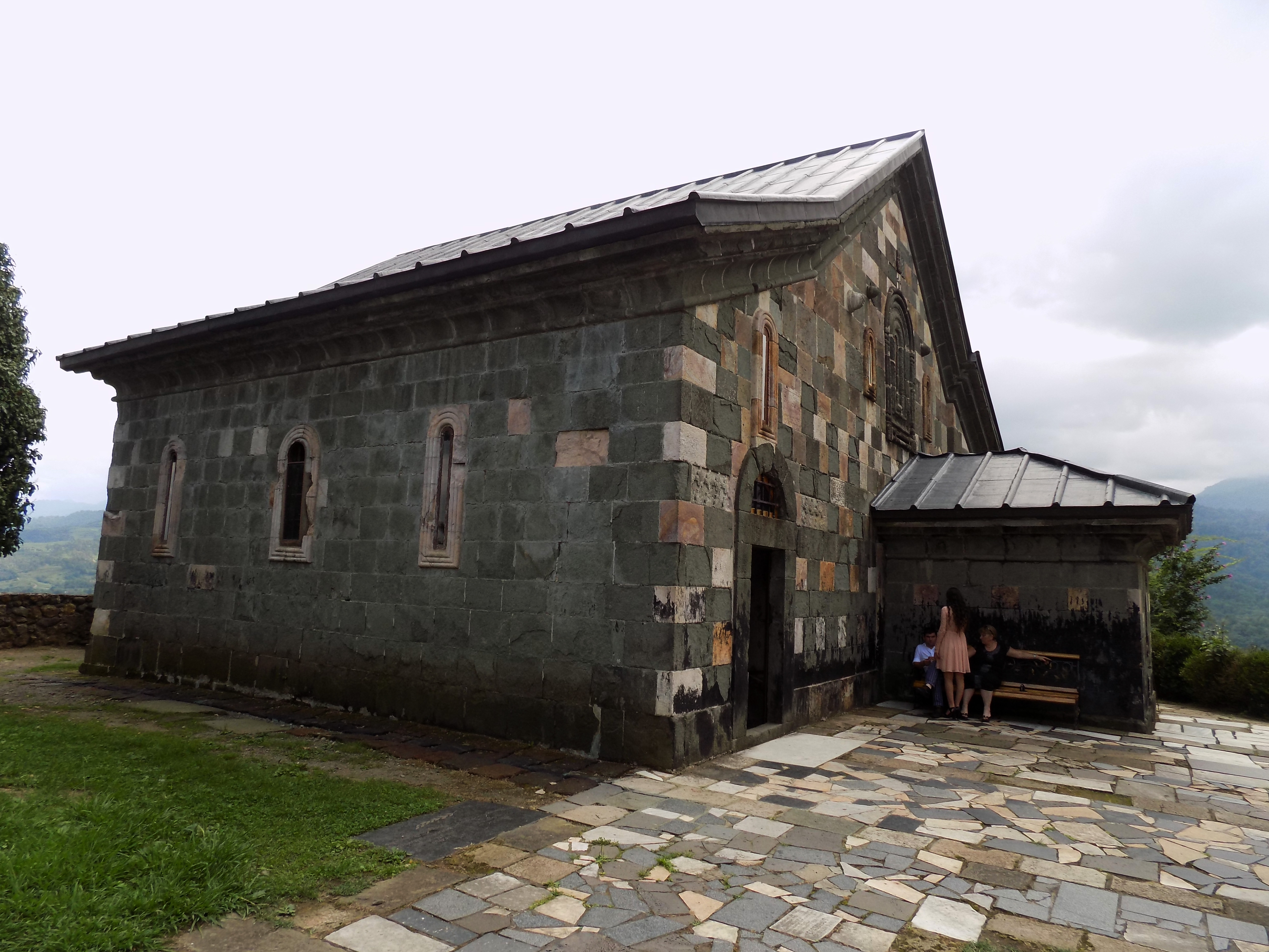 ეკლესია ღვთაებისა